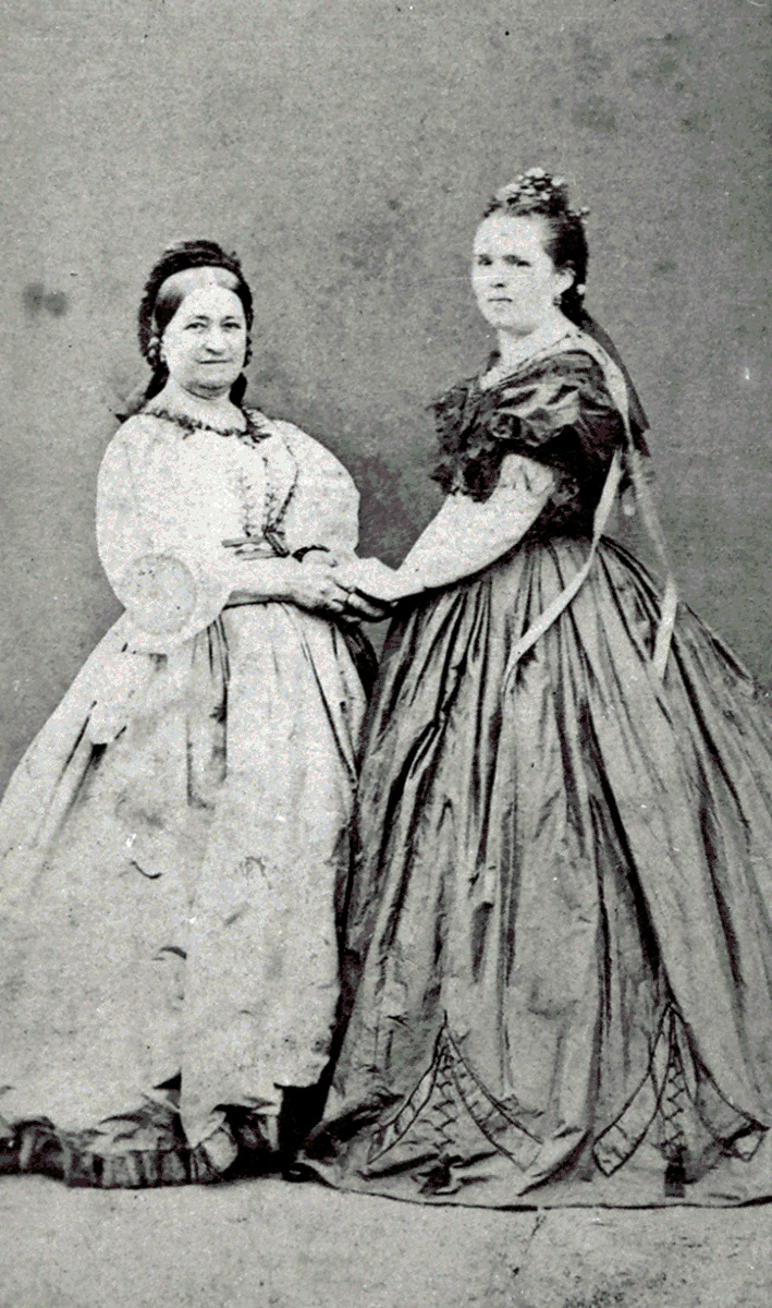 Rosalia Szluha (1816-1883), esposa de José Marton de Nemesnép y su hija Sofia Marton de Nemesnép (1842-1900), esposa de Francisco Farkas de Boldogfa (1838-1908), interventor monetario del condado de Zala, en Hungria.